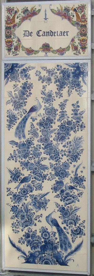 Delftsblauw paneel aan de Voldersgracht te Delft